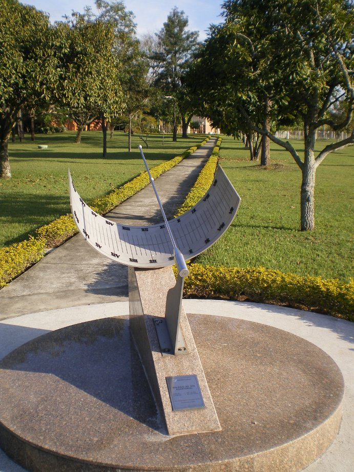 Relógio Solar na sede do Instituto Nacional de Pesquisas Espaciais.